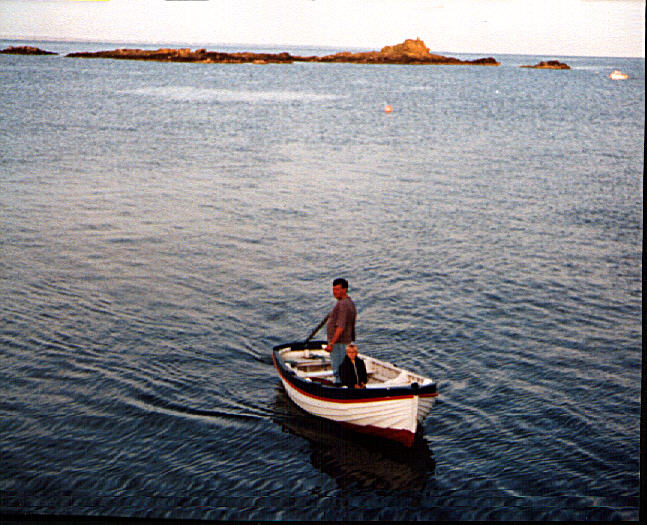 Blick vom Mousehole-Pier zur 'St.Clement's Insel' (Hulu 1996)